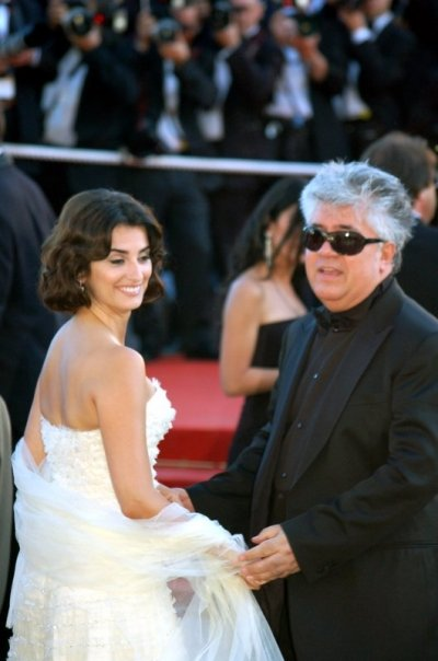 Penélope Cruz & Pedro Almodovar au festival de Cannes.(en el festival de Cannes):P